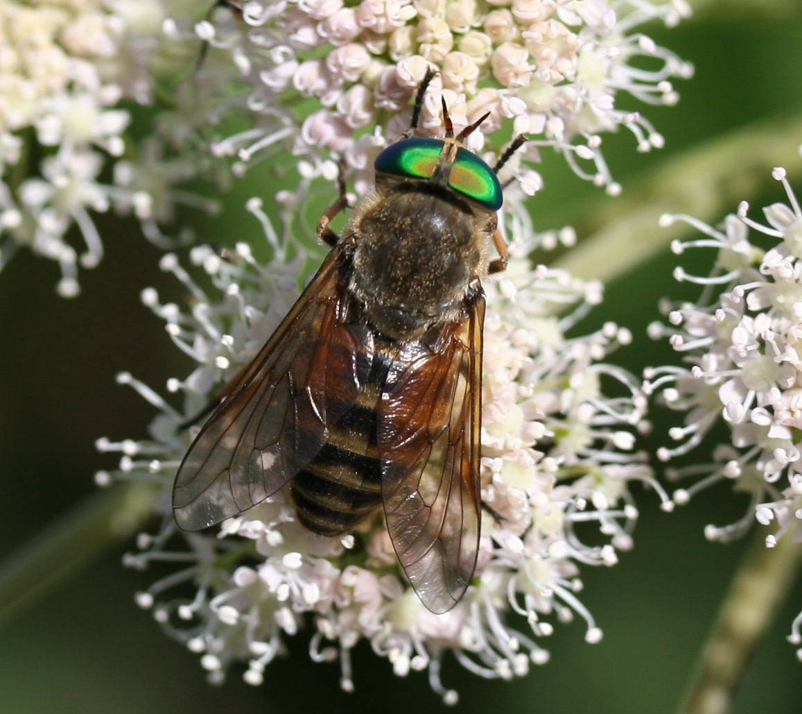 Diptera, Tabanidae